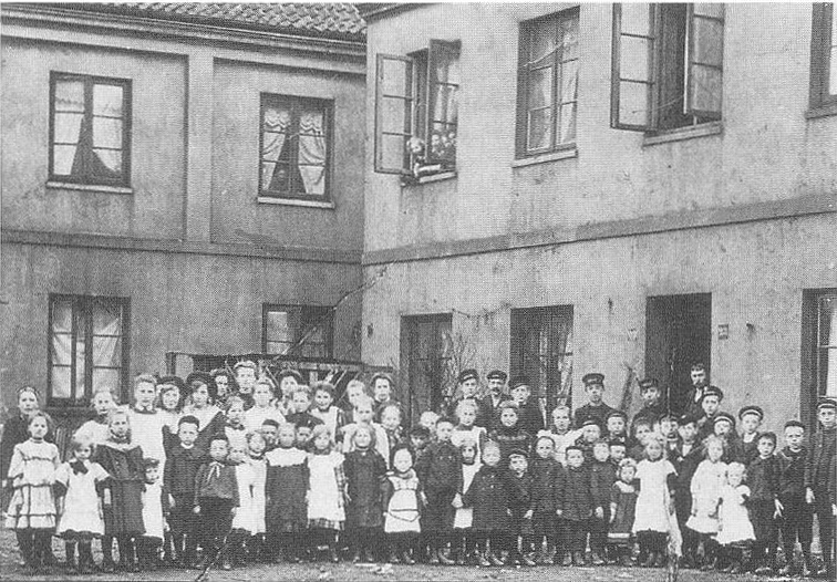 Children of gaffers, in the background company houses of Glasfabrik C.E.Gätcke in Ottensen next to Altona/Elbe (Germany) //Kinder von Glasarbeitern, im Hintergrund Werkswohnungen der Glasfabrik C.E.Gätcke in Ottensen bei Altona/Elbe